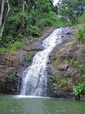 Cachoeira de Iporã (Iporã Waterfall) na FLONA - Floresta Nacional de Passa-Quatro, Passa Quatro, Brazil.